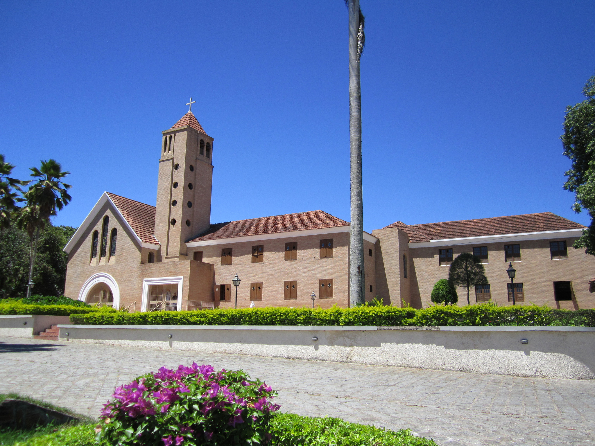 Seminário São José - Garanhuns, Pernambuco, Brasil